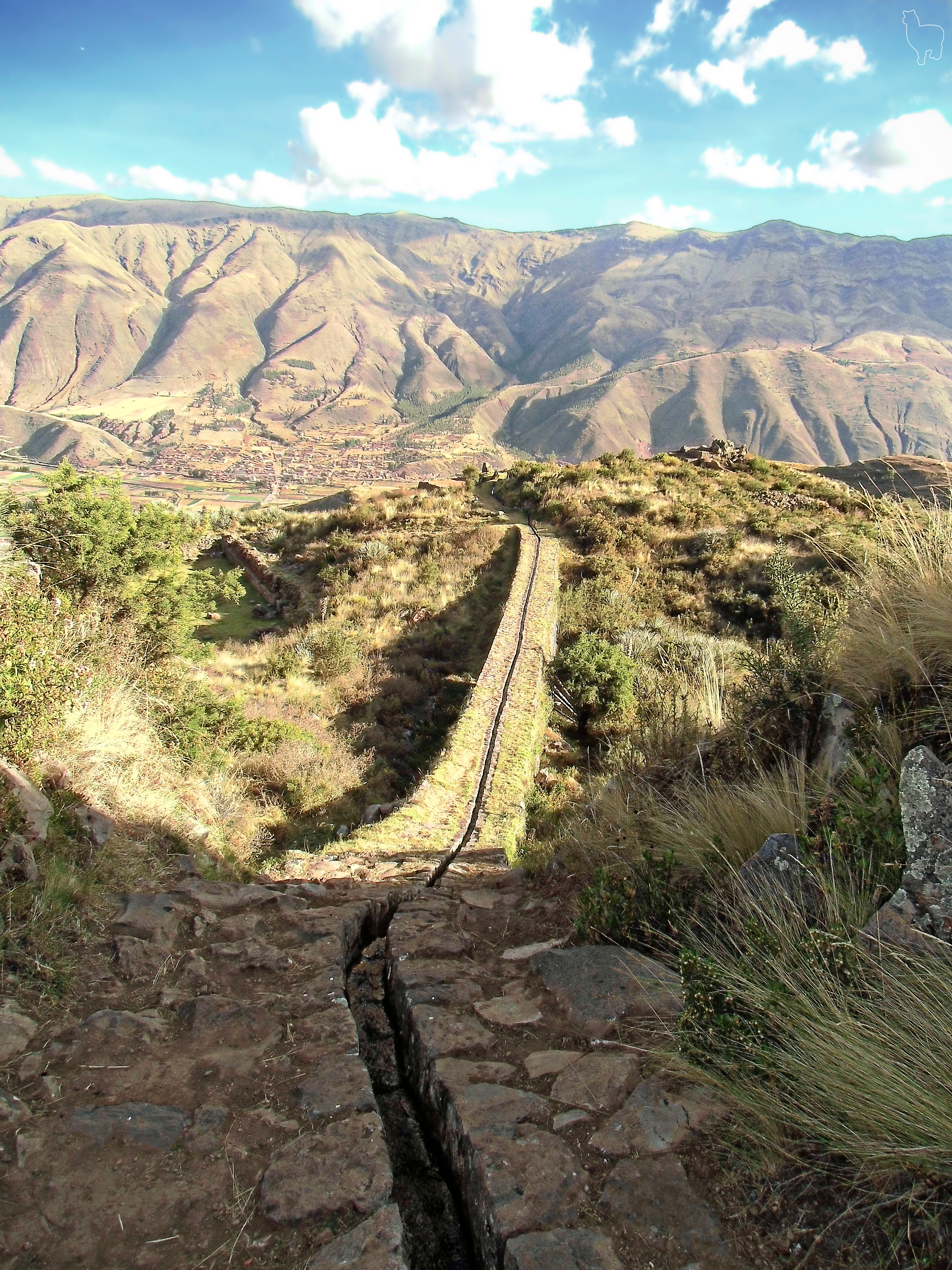 Incan aqueduct at Tipon. Cusco, Peru